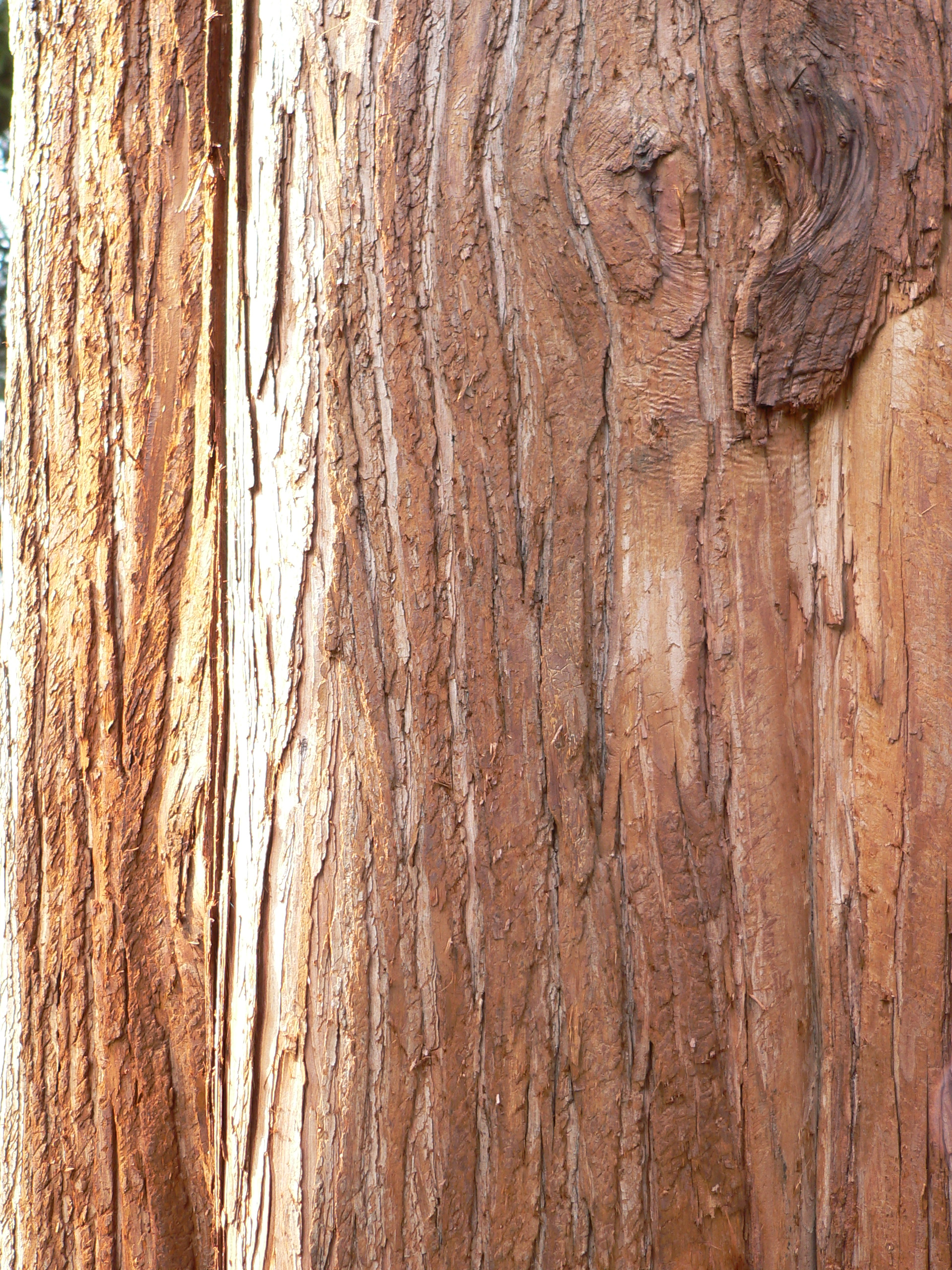 Cupressus nootkatensis